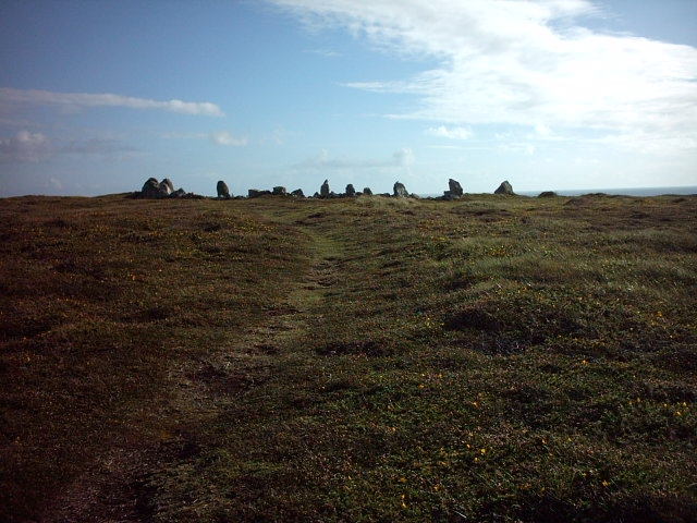 Lieu : Île d'Ouessant (Bretagne/France) Cromlech